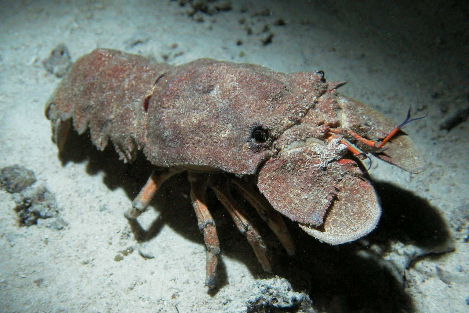 Großer Bärenkrebs (scyllarides latus), fotografiert bei einem Nacht-Tauchgang bei Tobia Arba / Safaga / Rotes Meer / Ägypten.